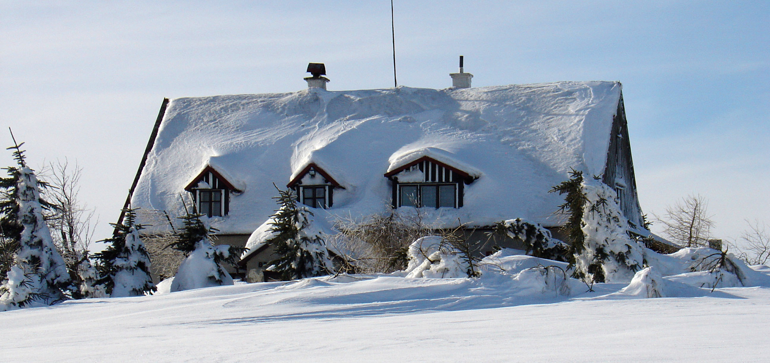 Cinovec typisches Gebirgshaus